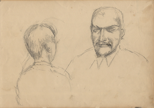 Кузьма Петров-Водкин (1878-1939). Мужские головы. РГАЛИ, ф. 2010 оп. 1 ед. хр. 92 л. 11. Этюды к картине "Новоселье".